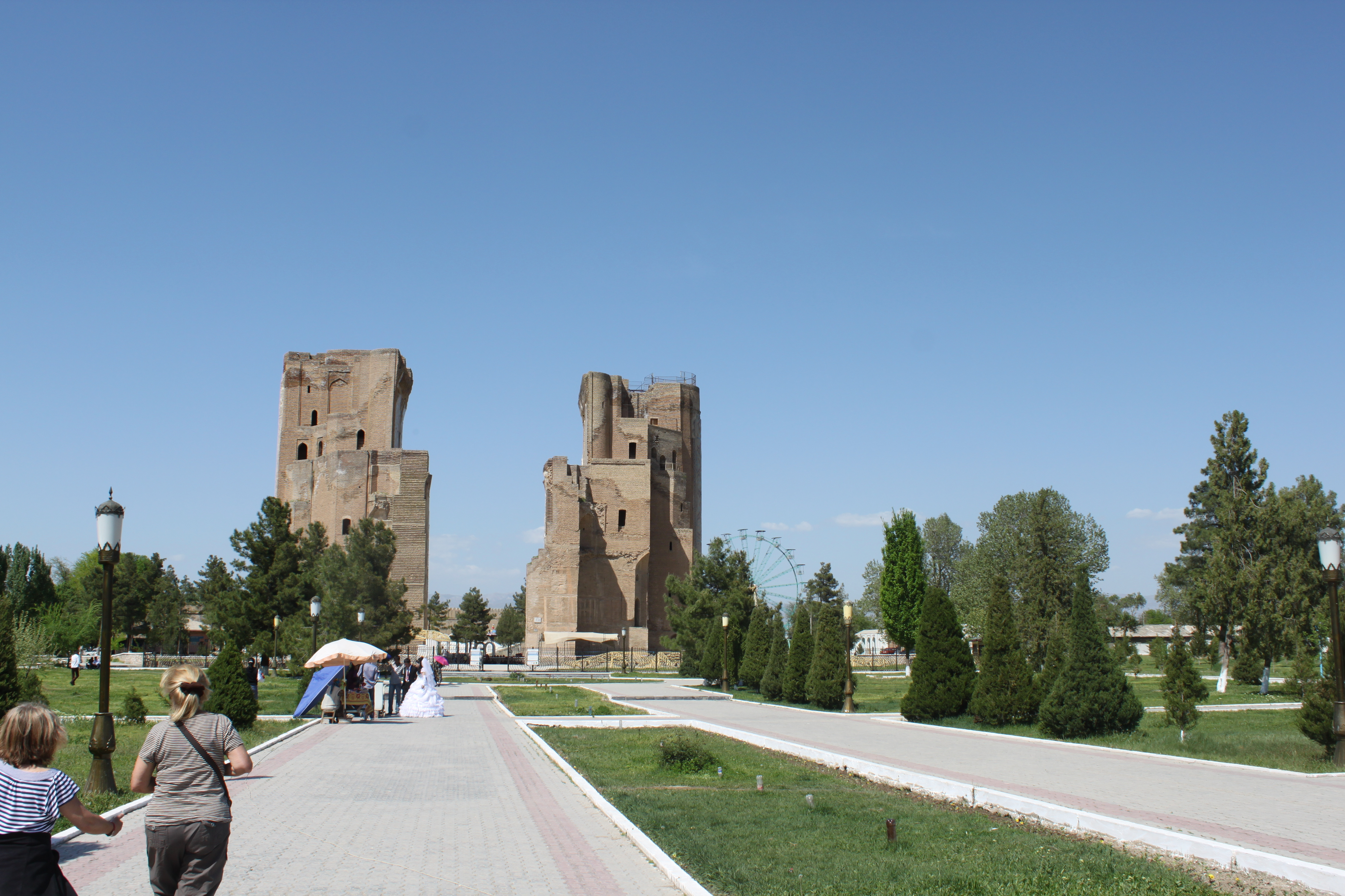 Ak Sarai à Shahrisabzk